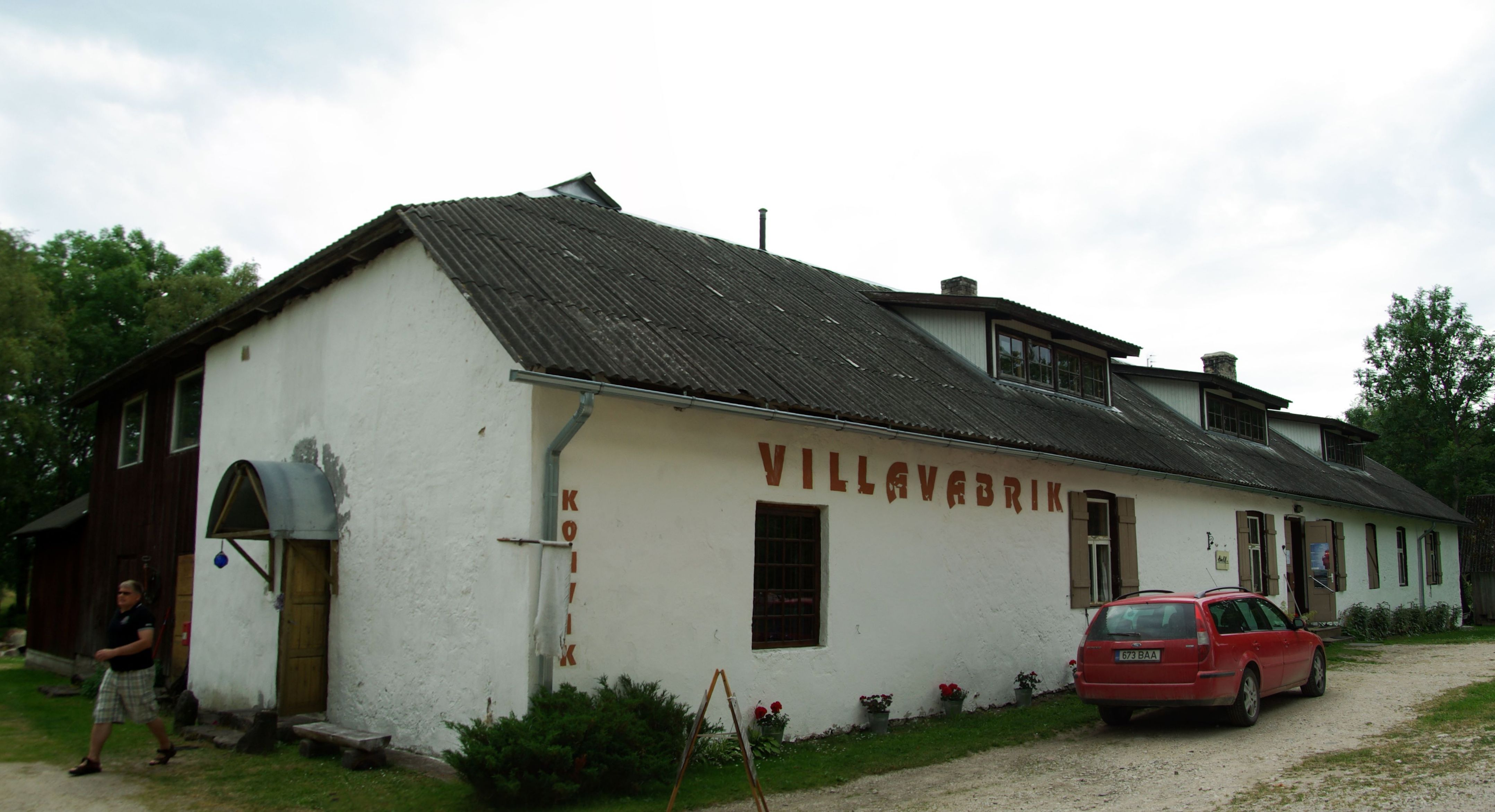 Vaemla mõisa villaveski